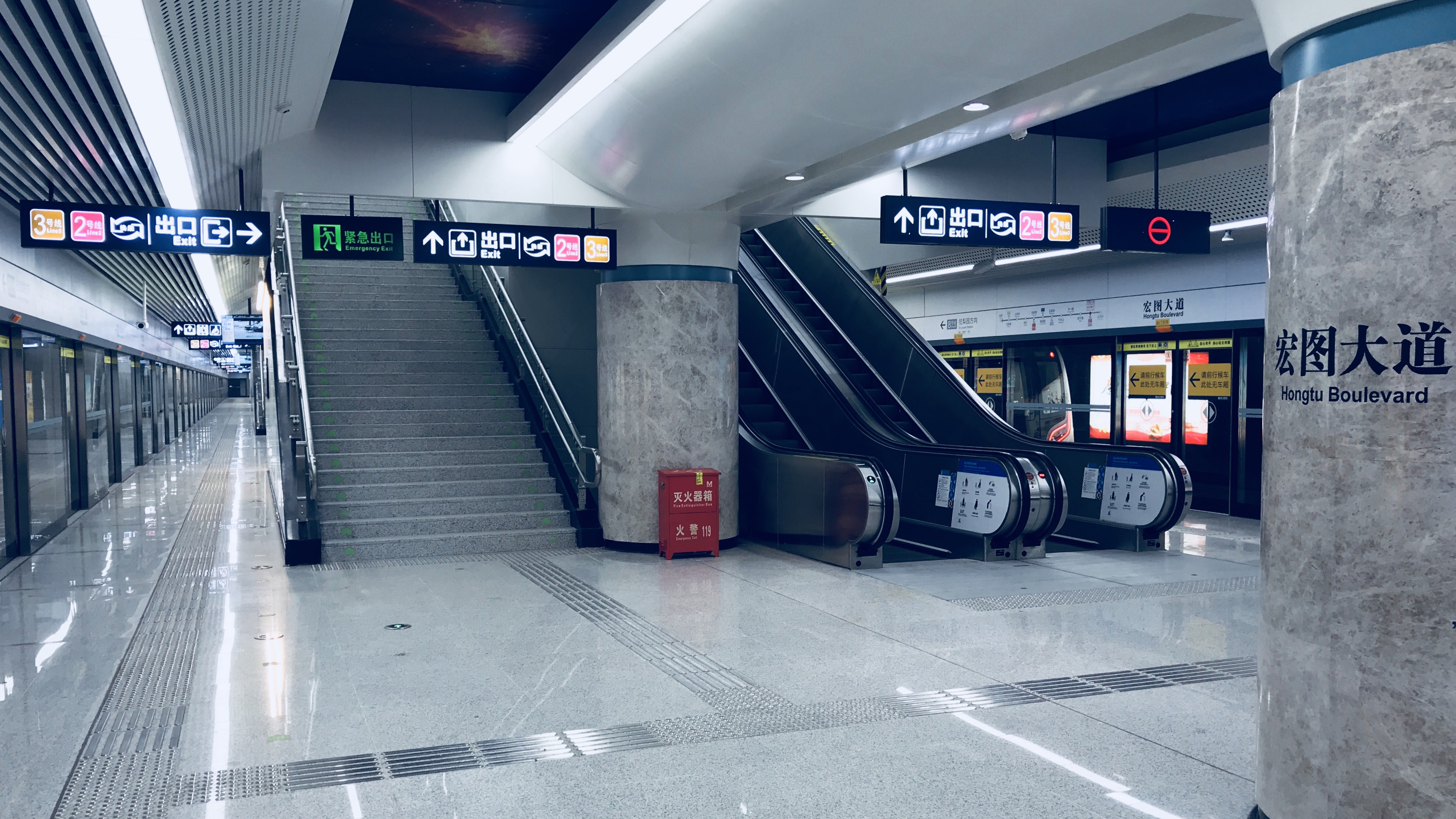 中文（中国大陆）: 武汉轨道交通8号线宏图大道站月台